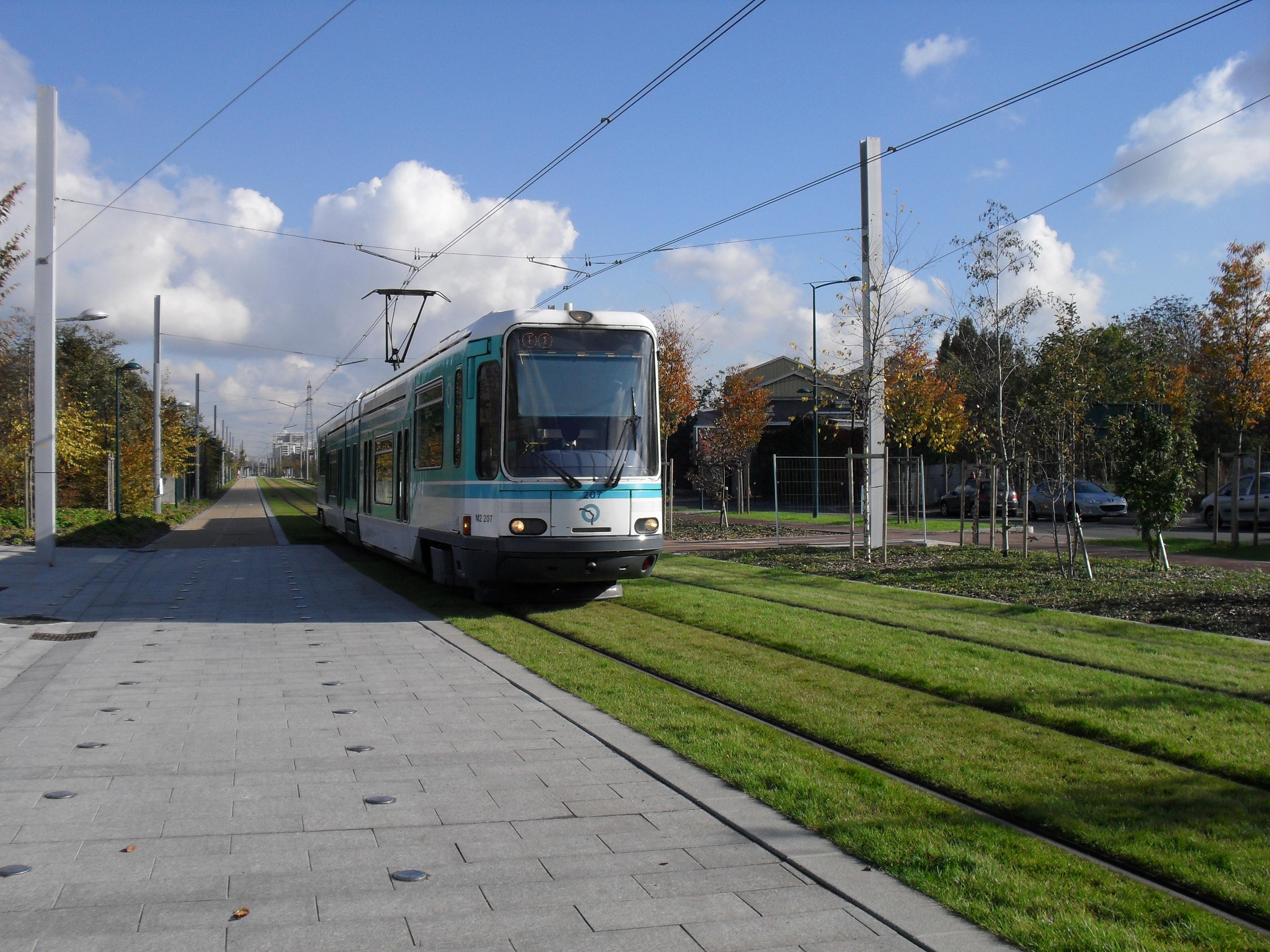 Paris Tramway ligne 1